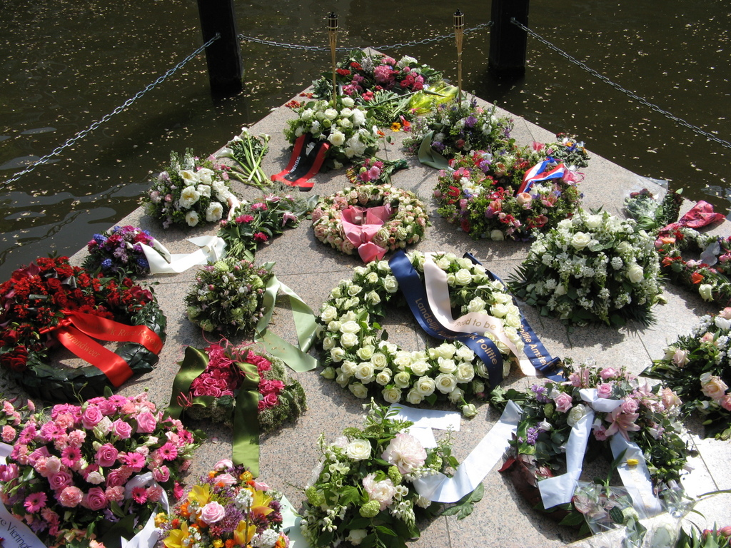 Pointe du Homomonument (Amsterdam) située sur le bord du canal